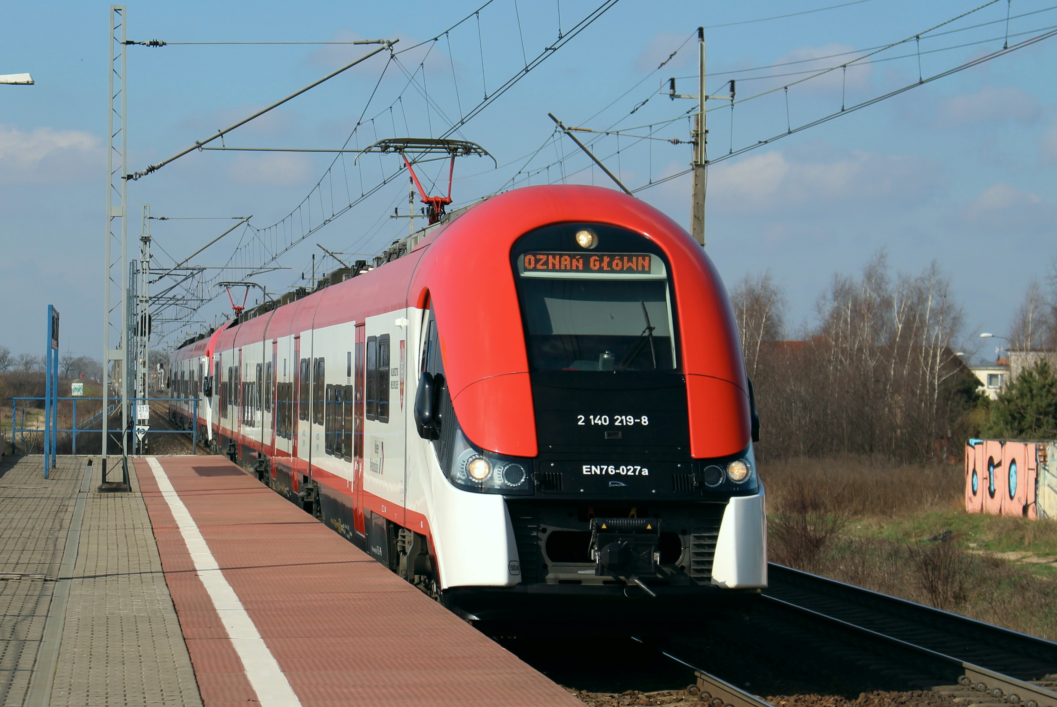 Poznan Junikowo, 28 March 2016.